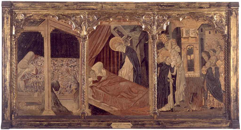 La obra representa tres escenas de la vida de Santo Domingo de Guzmán, el fundador de la Orden de los dominicos.